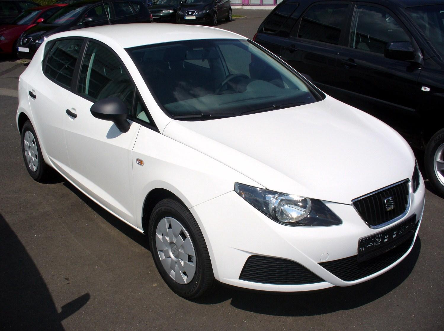 Seat Ibiza 6J